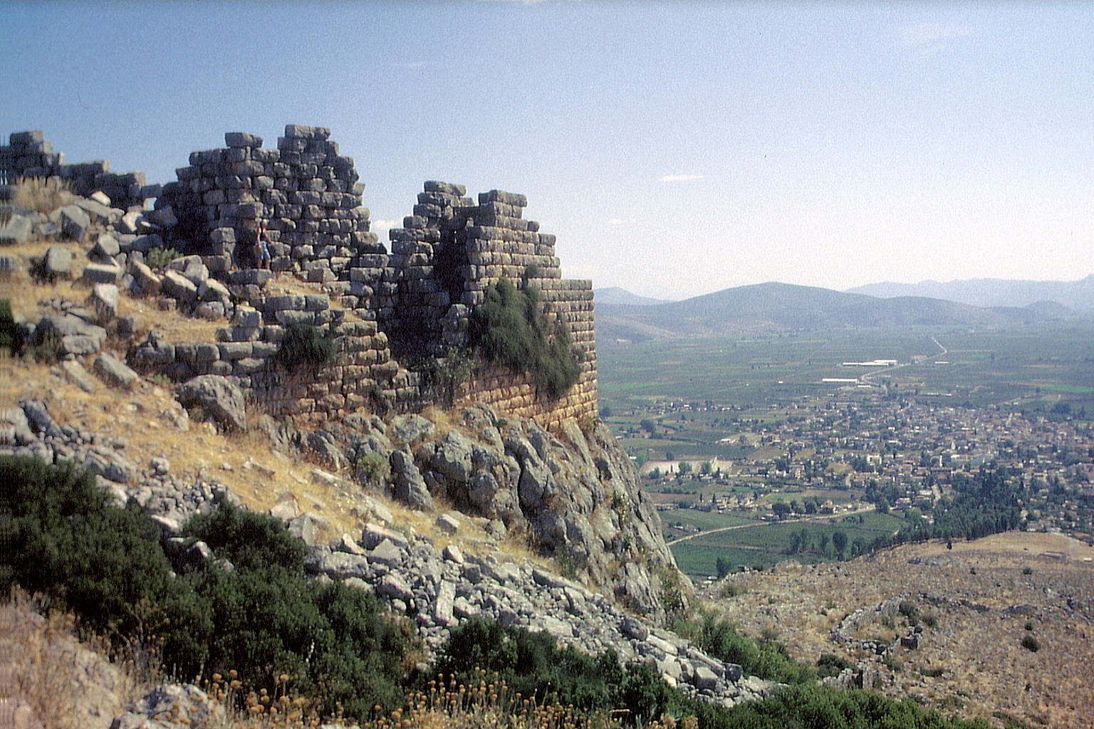 Akropolis von Orchomenos aus WSW, i.Hg. das Kopais-Tal mit dem Ort Orchomenos